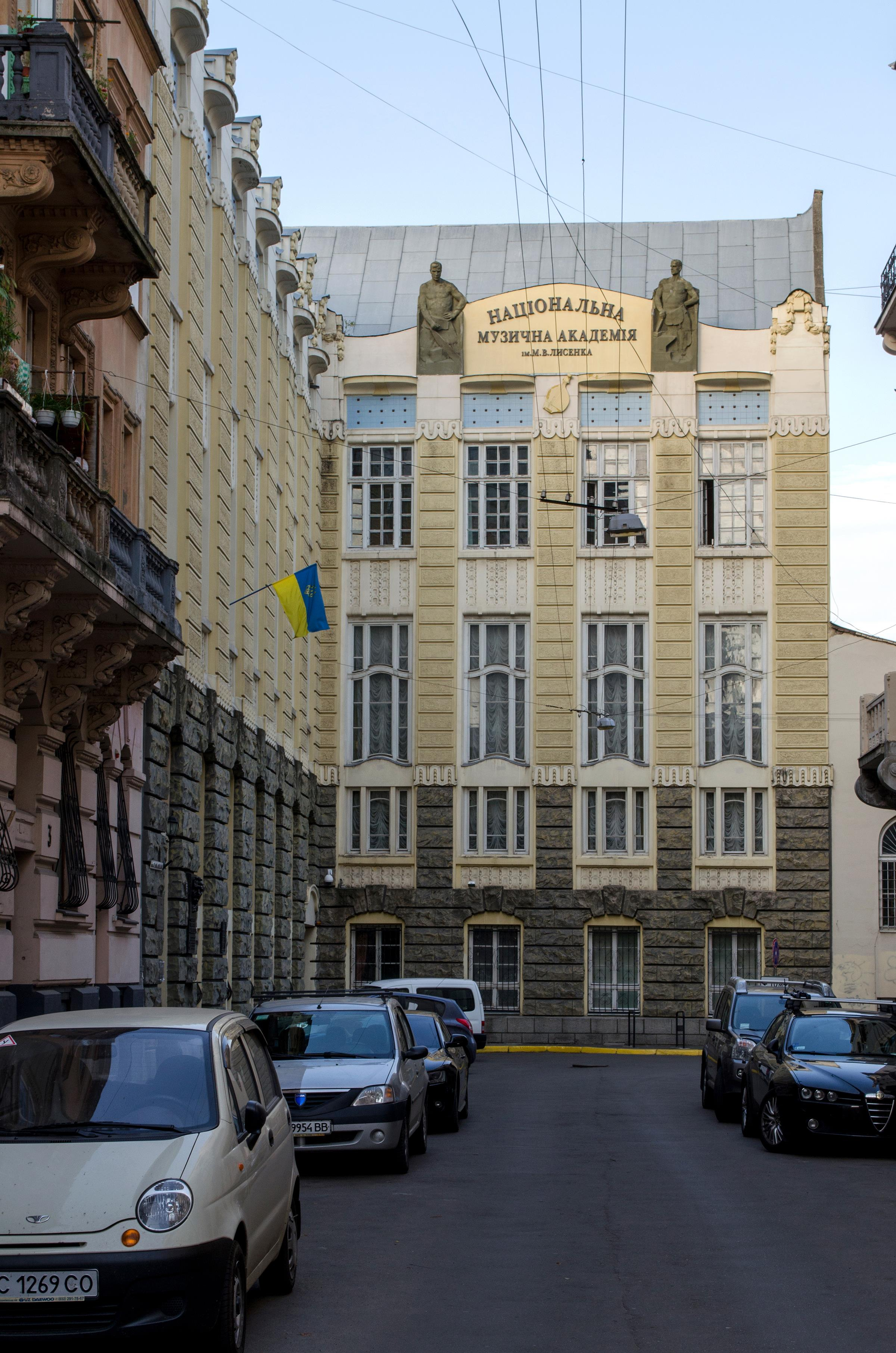 Консерваторія, в якій працював Людкевич С. П., український композитор, педагог, музикознавець, Львів, Нижанківського О., 5